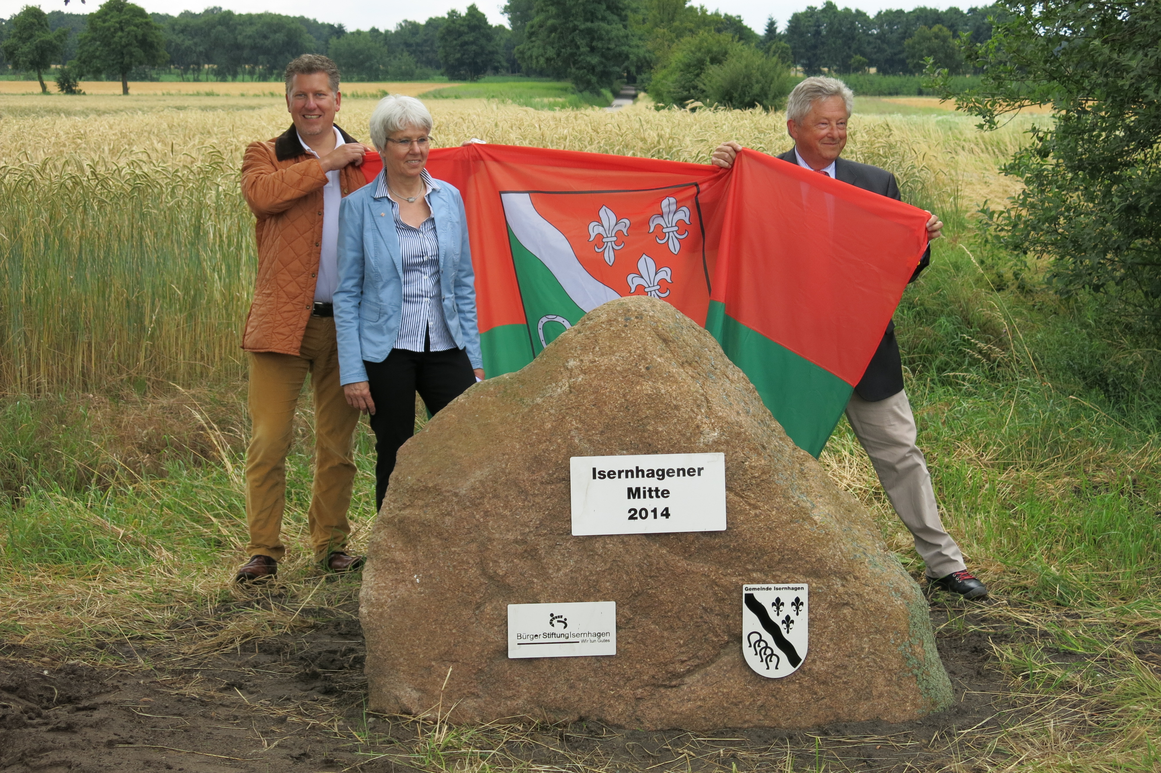 Enthüllung eines Findlings anlässlich der Einweihung der Isernhagener Mitte am 29. Juni 2014